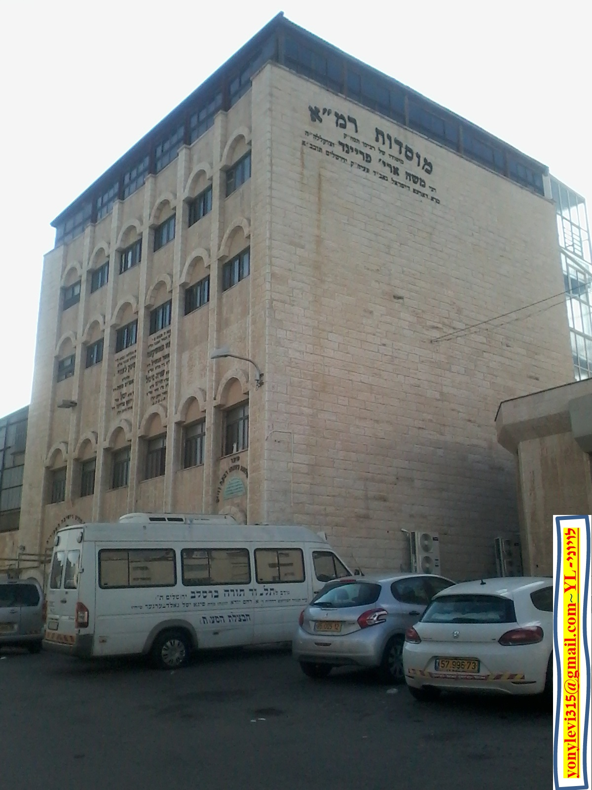 מוסדות רמ"א פריינד בירושלים, על שם רבי משה אריה פריינד